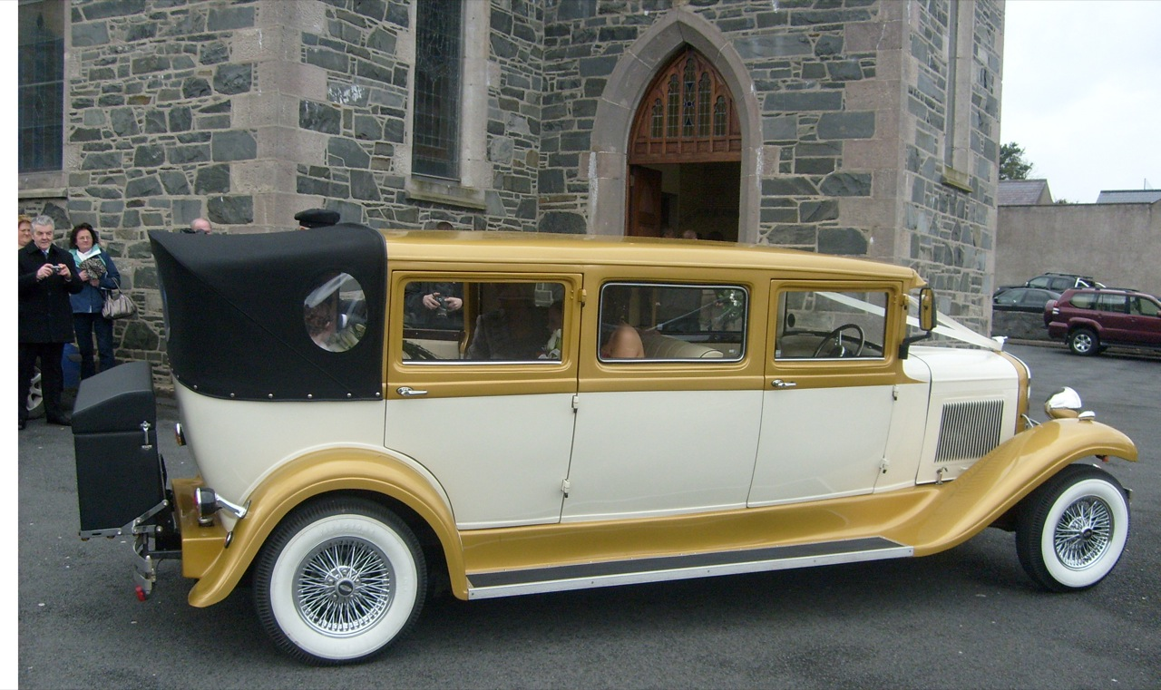 Wedding car